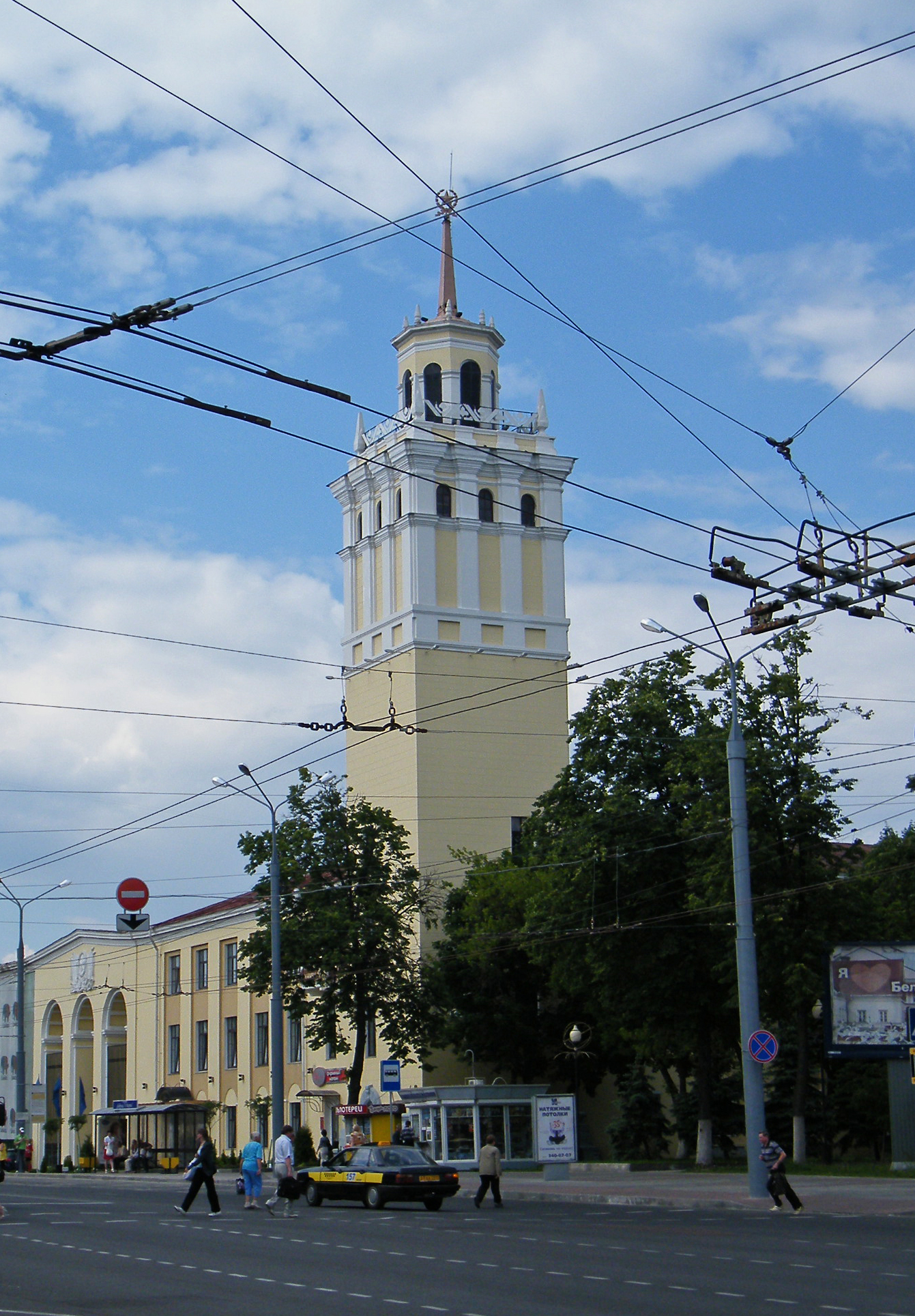 Гомельская высотка